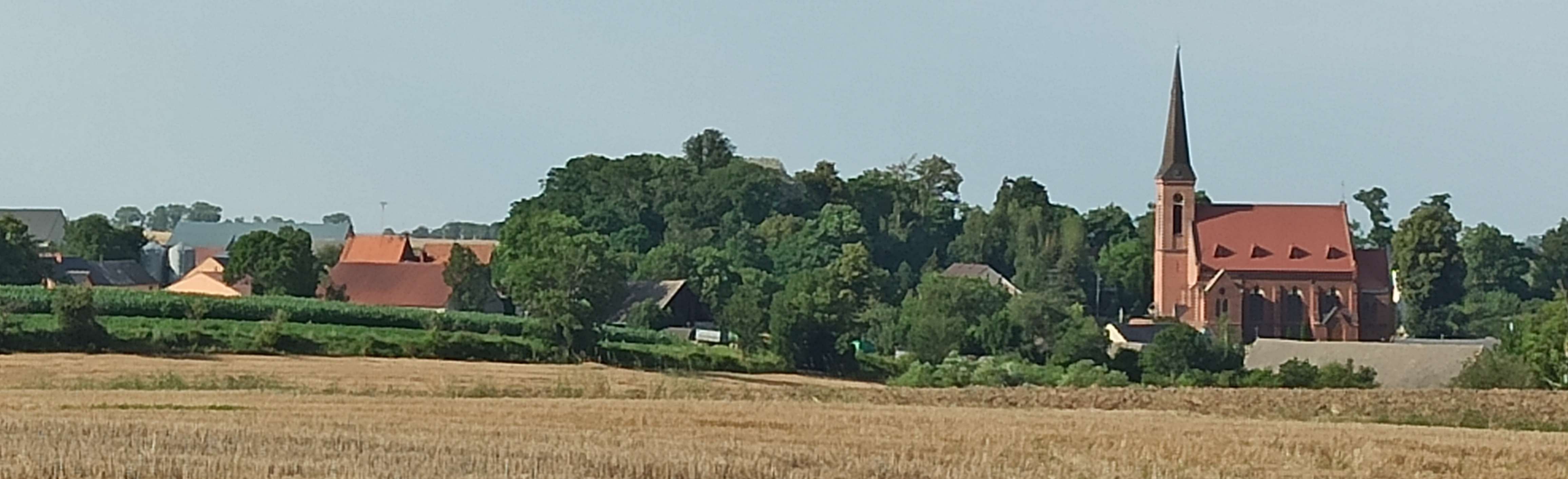 Prężyna, (dodatkowa nazwa w j. niem. Groß Pramsen) – wieś w Polsce położona w województwie opolskim, w powiecie prudnickim, w gminie Biała.